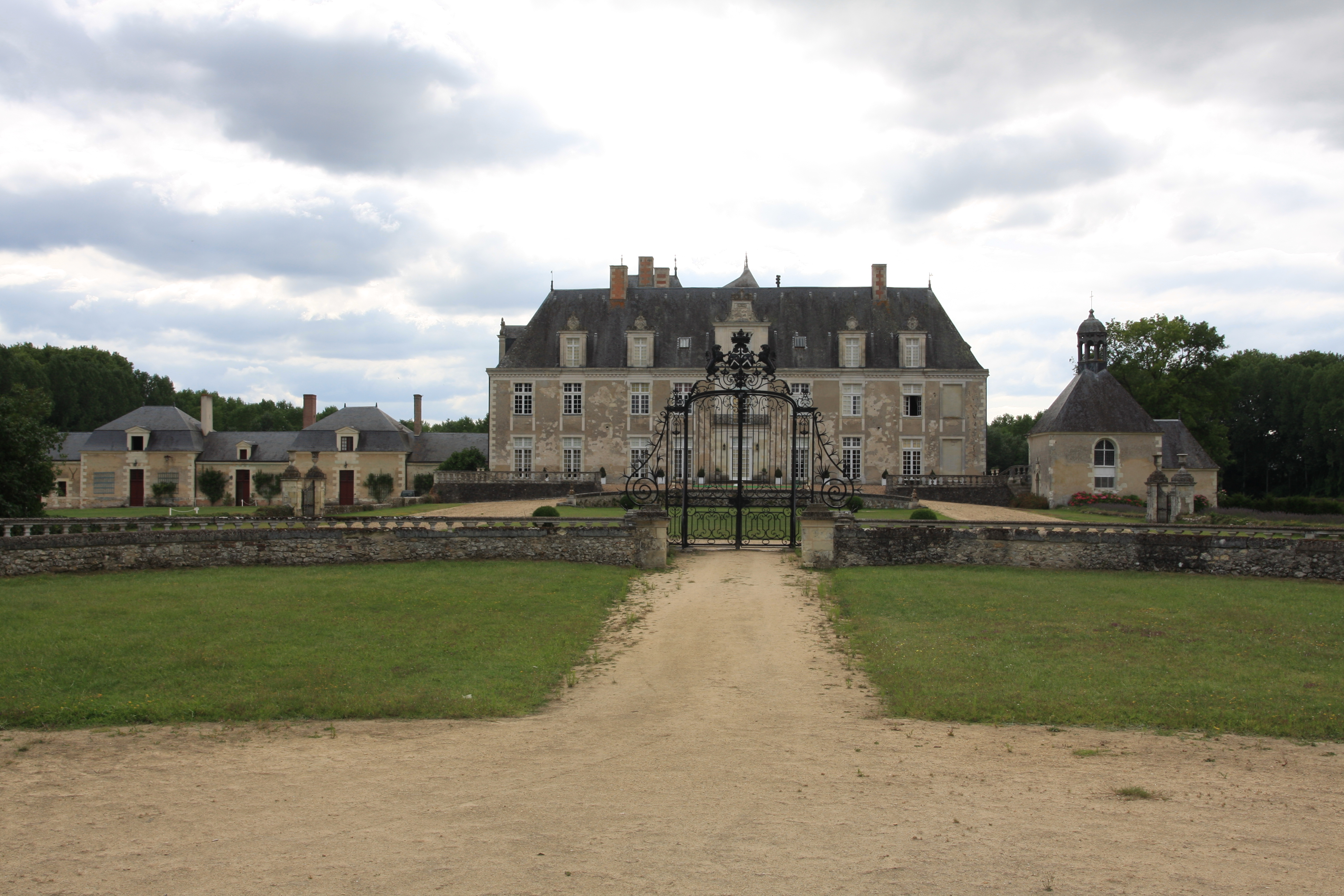 Chateau Champchevrier